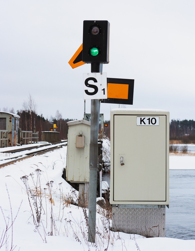 Varkauden Pirttiniemen kääntösiltaa vartioiva siltaopastin S1 näyttää aja-opastetta.